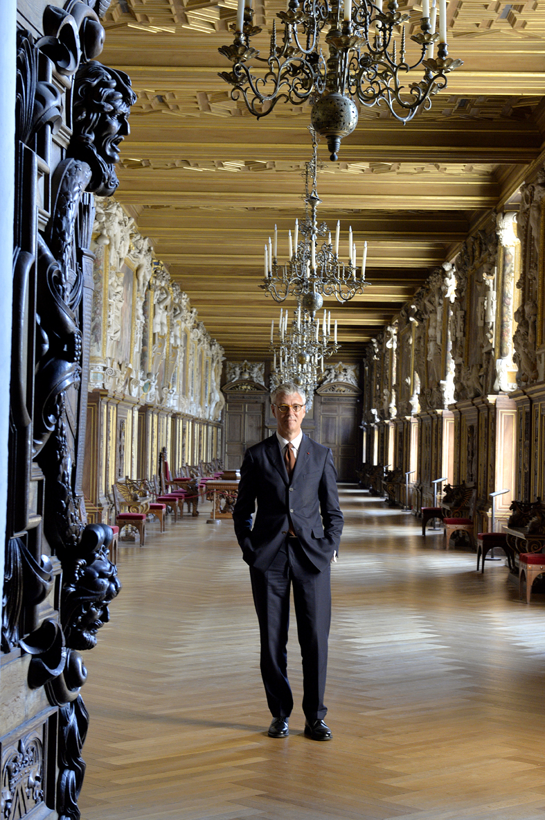 Jean-François Hebert